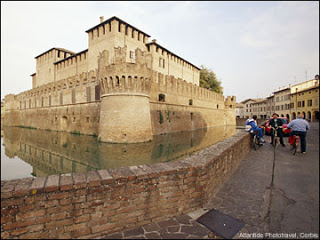 Imatge medieval de Parma